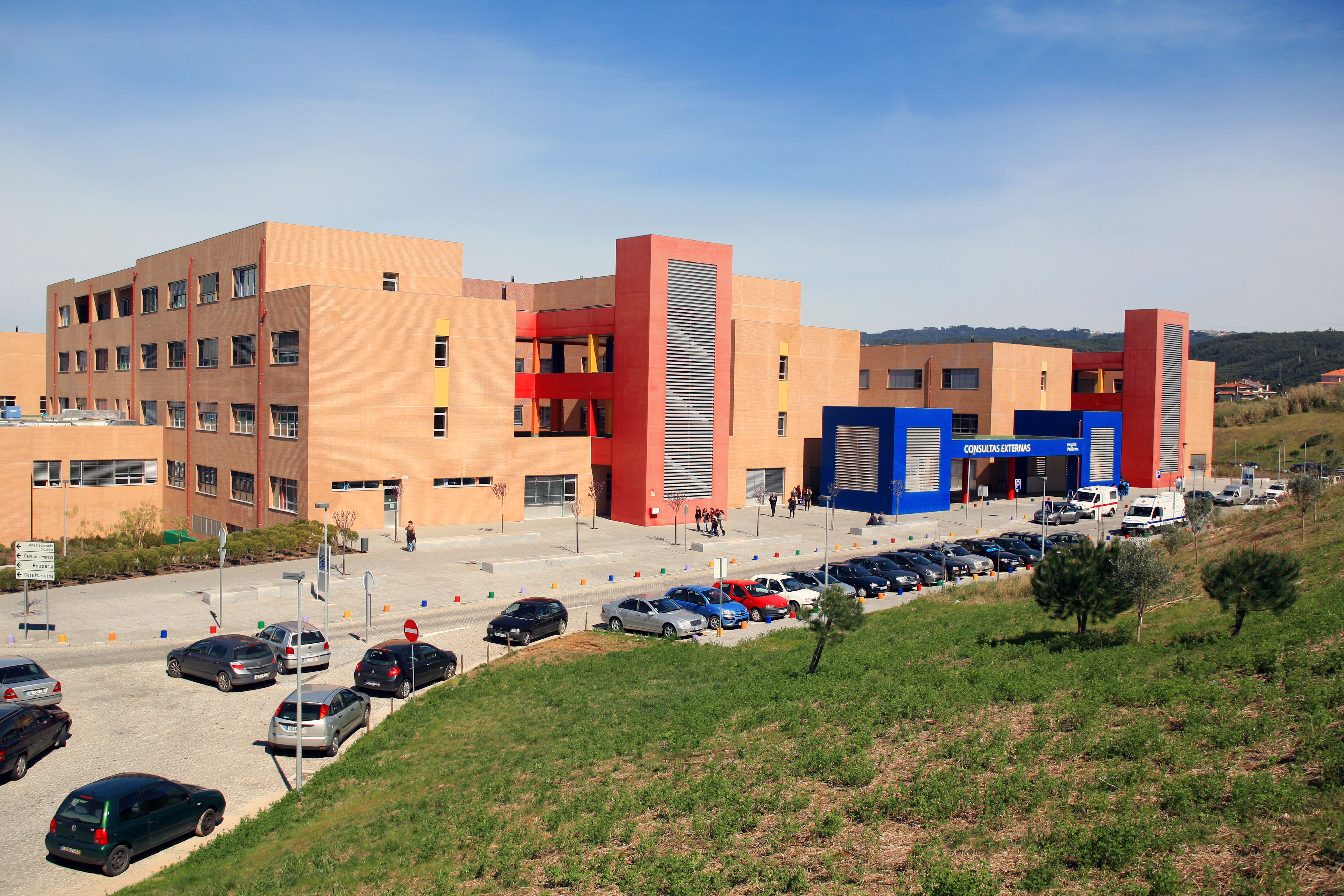 Polo Hospital Pediátrico do CHUC